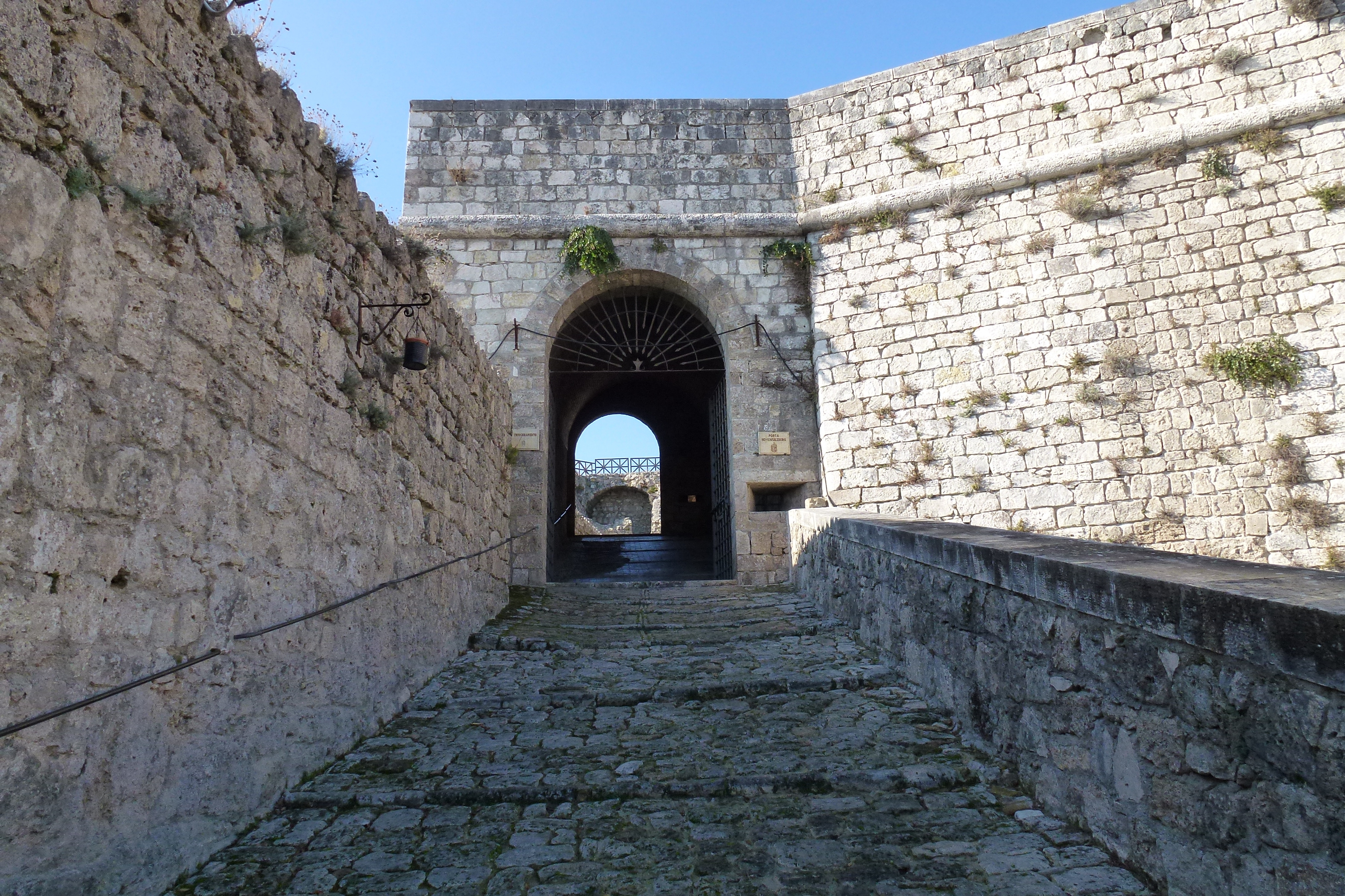 Civitella del Tronto-Entrata superiore